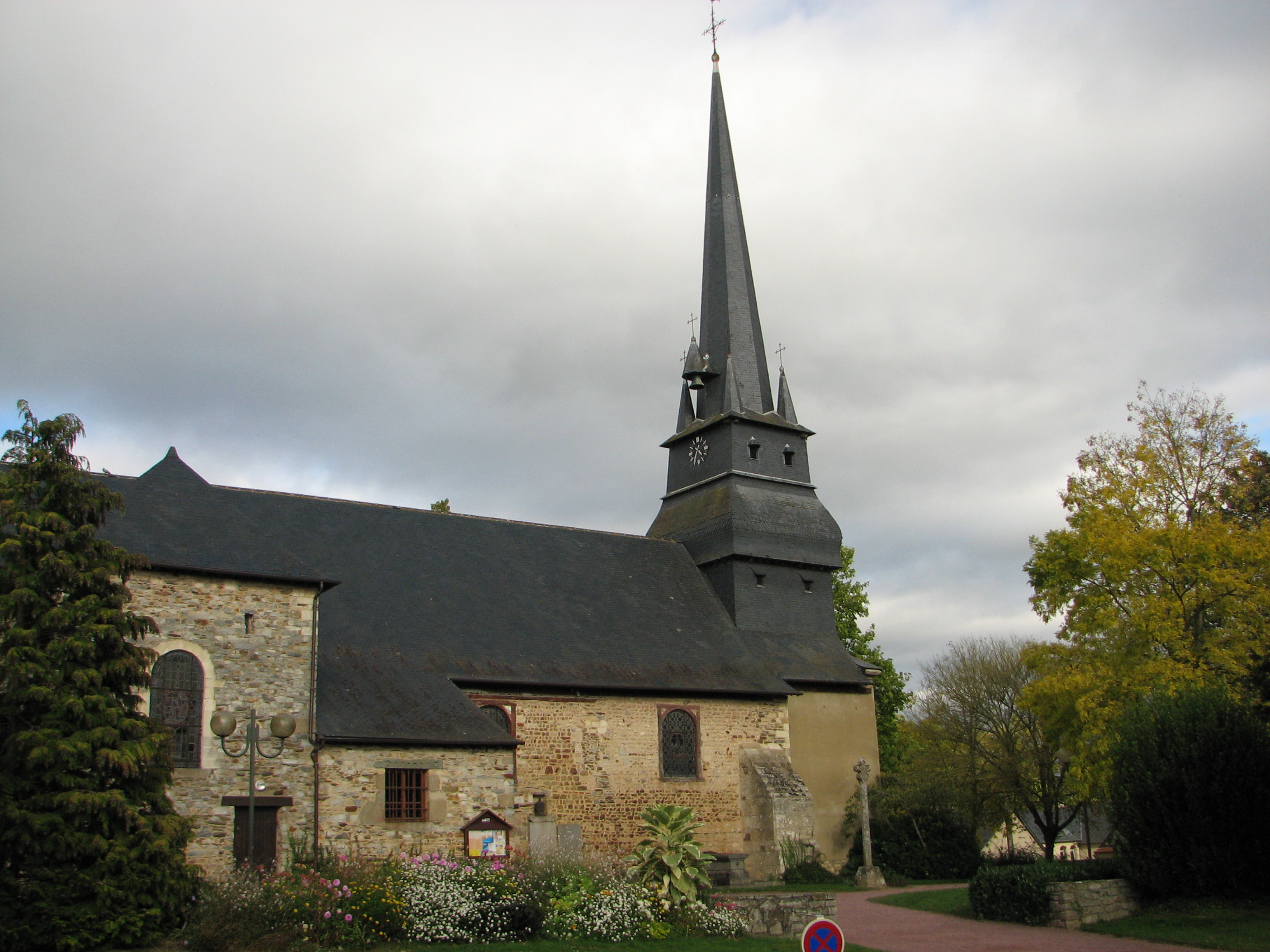 Eglise de Saint-Grégoire, au nord de Rennes en Ille-et-Vilaine